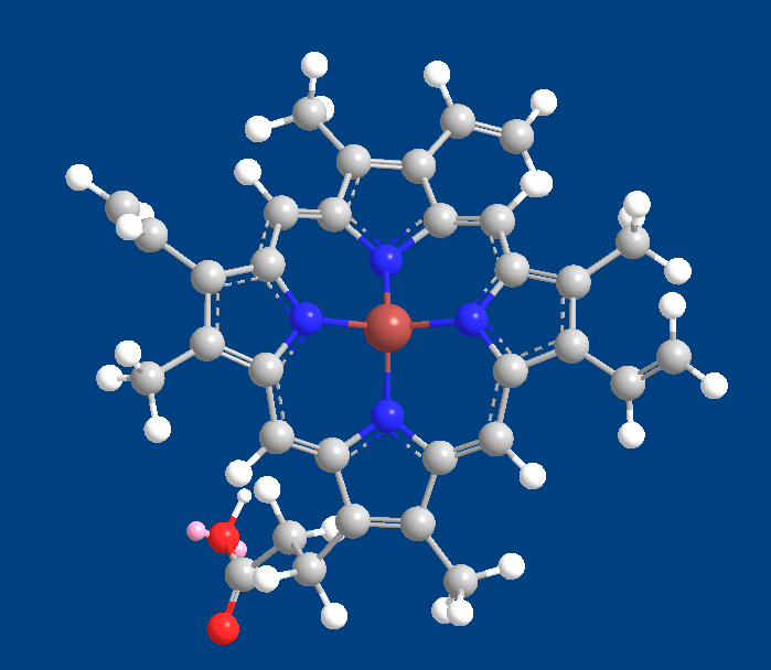 血红素分子模型，自己用chemoffice搭的，本图片不允许百度百科使用